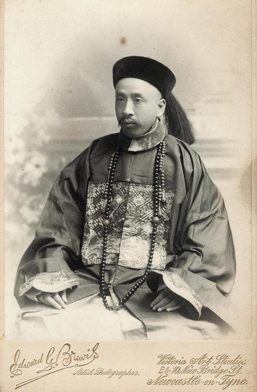 中文（中国大陆）: 廖恩燾像